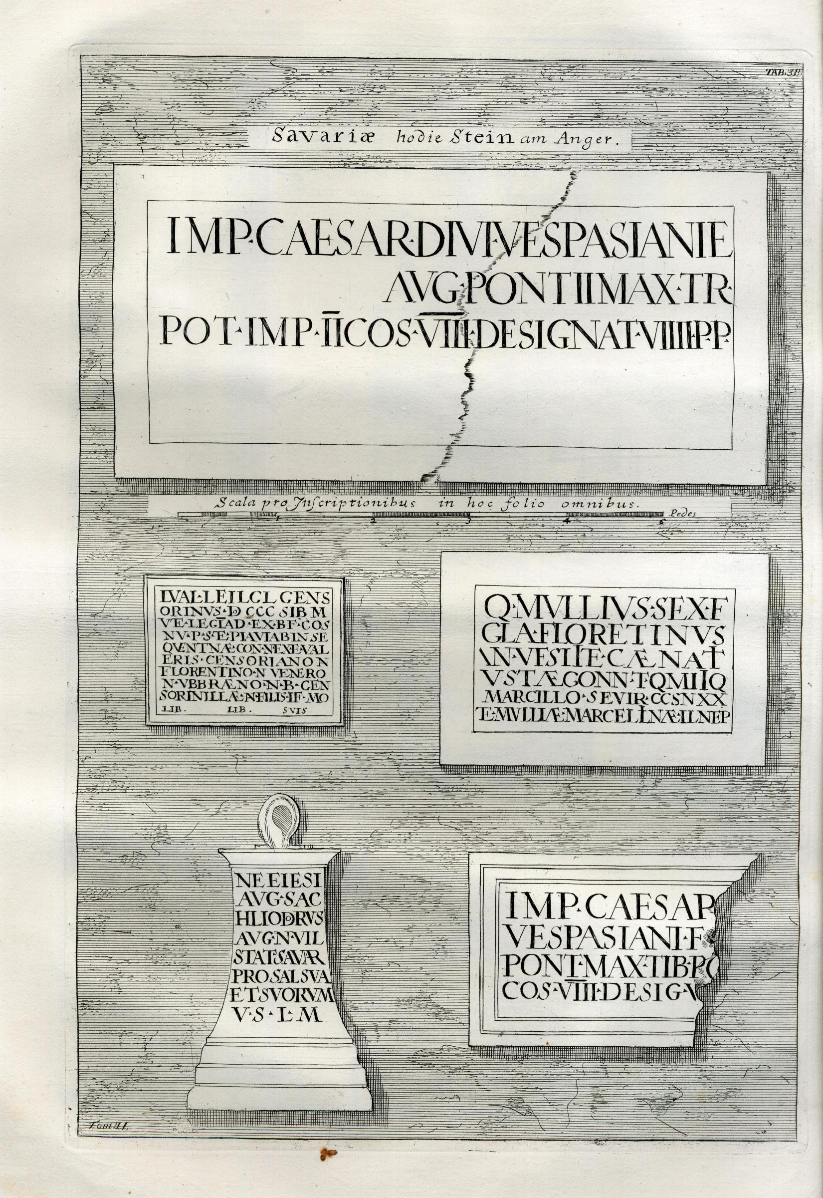 Luigi Ferdinando Marsigli által lert római táblák a Gospodin-szirtnél, ahol sziklafelirat hirdeti a rómaiak műszaki tevékenységét , Danubius Pannonico-mysicus observationibus geographicis, astronomicis, hydrographicis, historicis, physicis, perlustratus et in sex tomos digestus